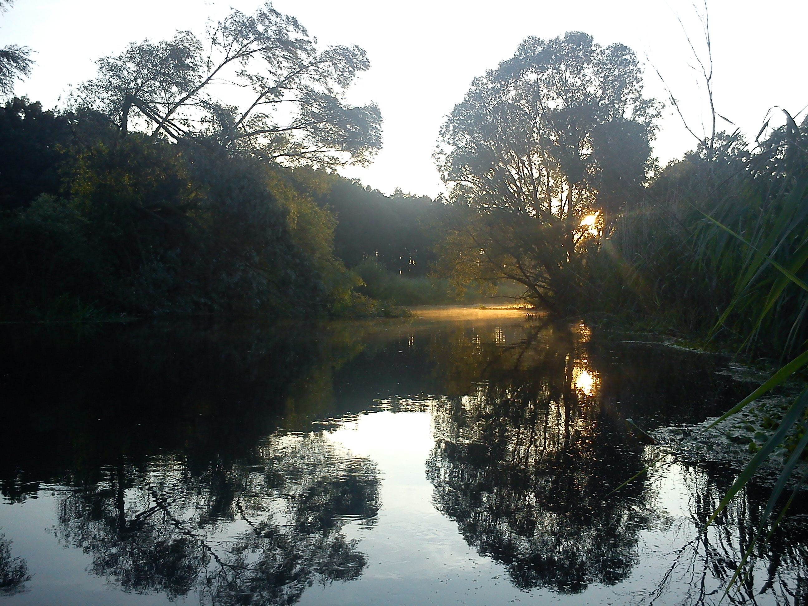 Obra na odcinku Trzciel - Pszczew.